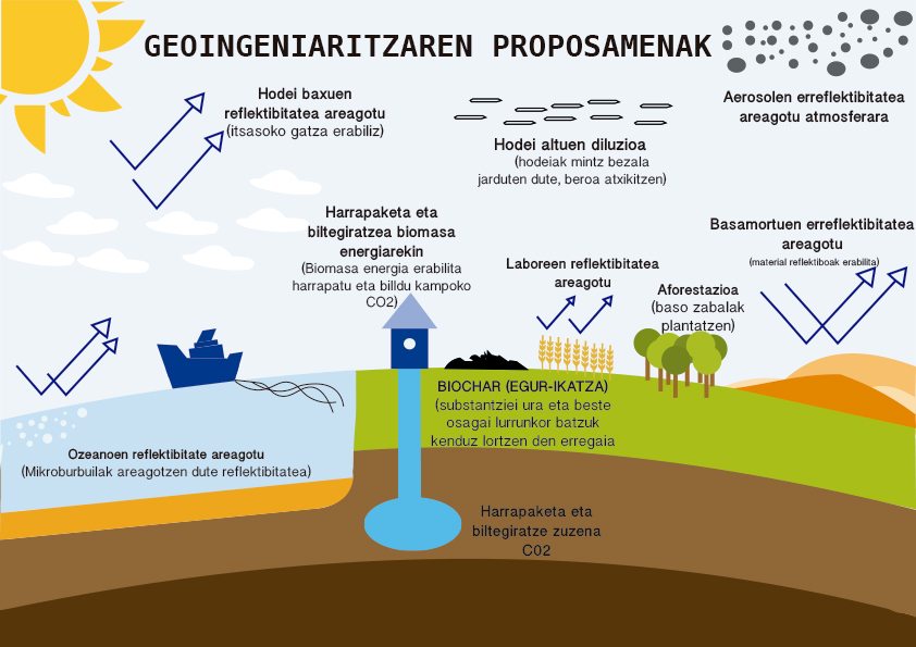 Geoingeniaritzaren proposamenak